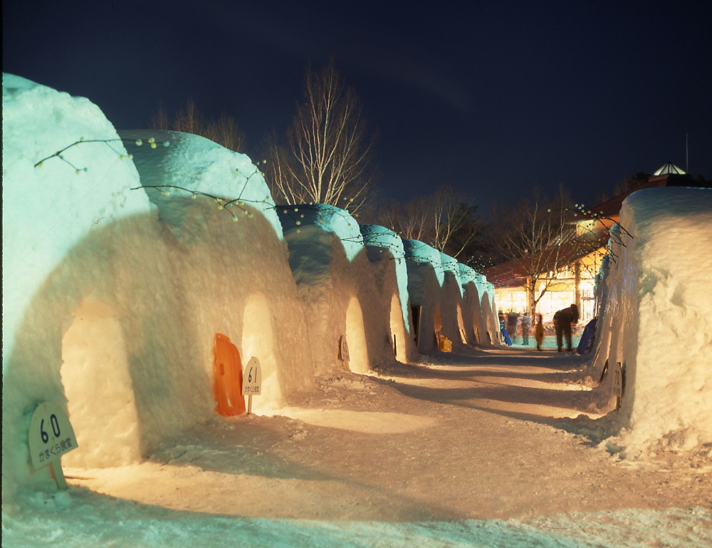 A dining room in Koiwai Farm